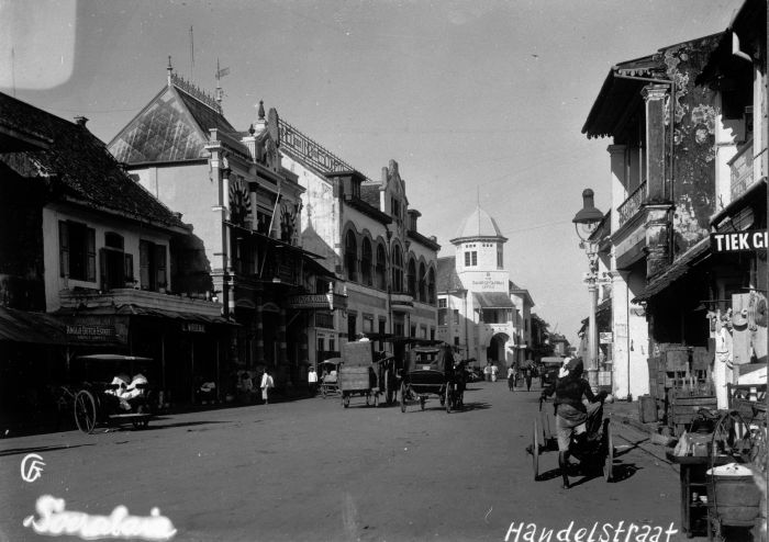 Foto. De Handelstraat in Soerabaja, Oost-Java.